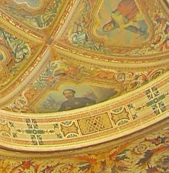 Retrat Joan Prim per Mateu Balasch i Mateu al Saló Sant Jordi Generalitat de Catalunya